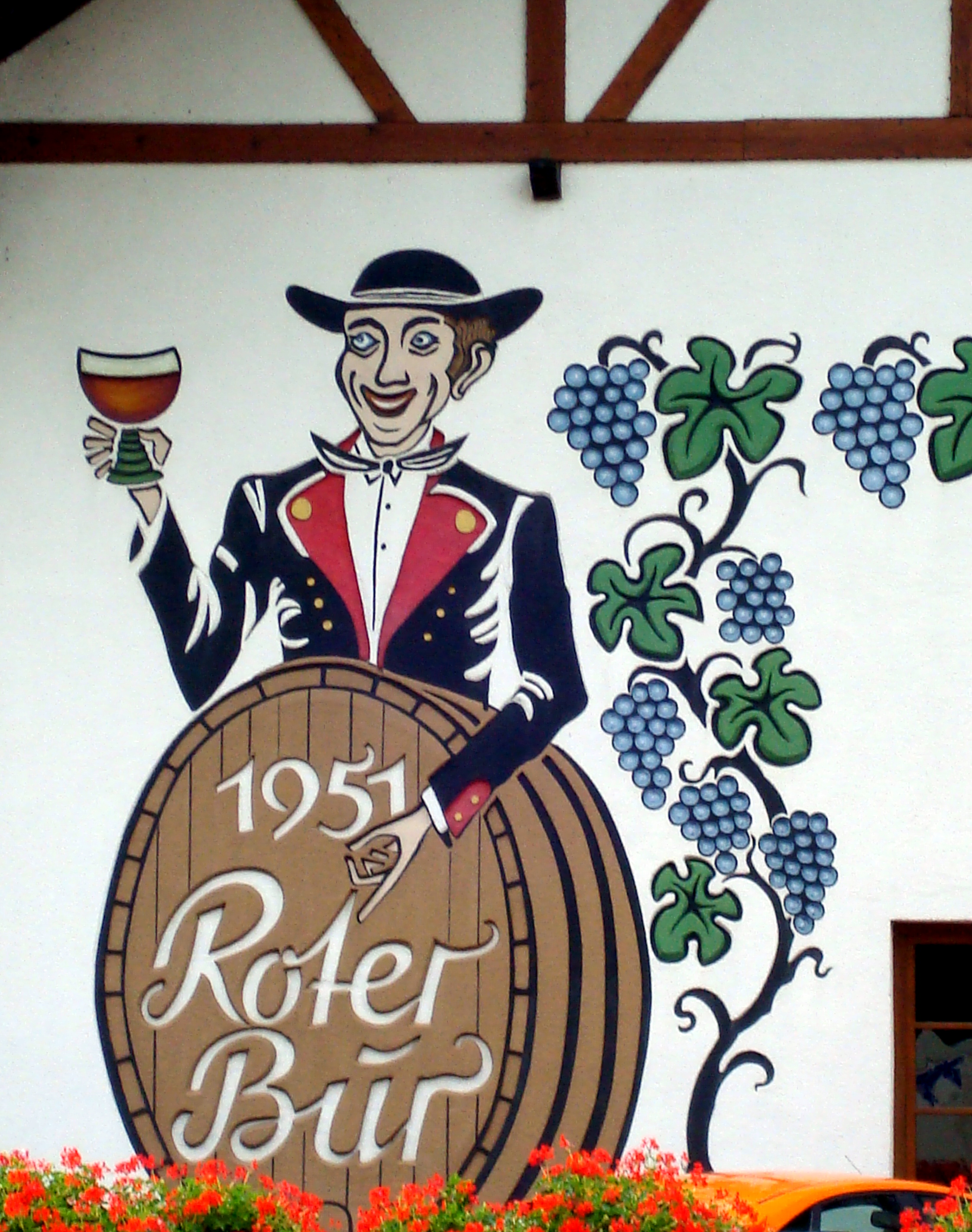 Markenzeichen des "Roten Burs" an einer Außenwand des Gebäudes der Winzergenossenschaft Glottertal